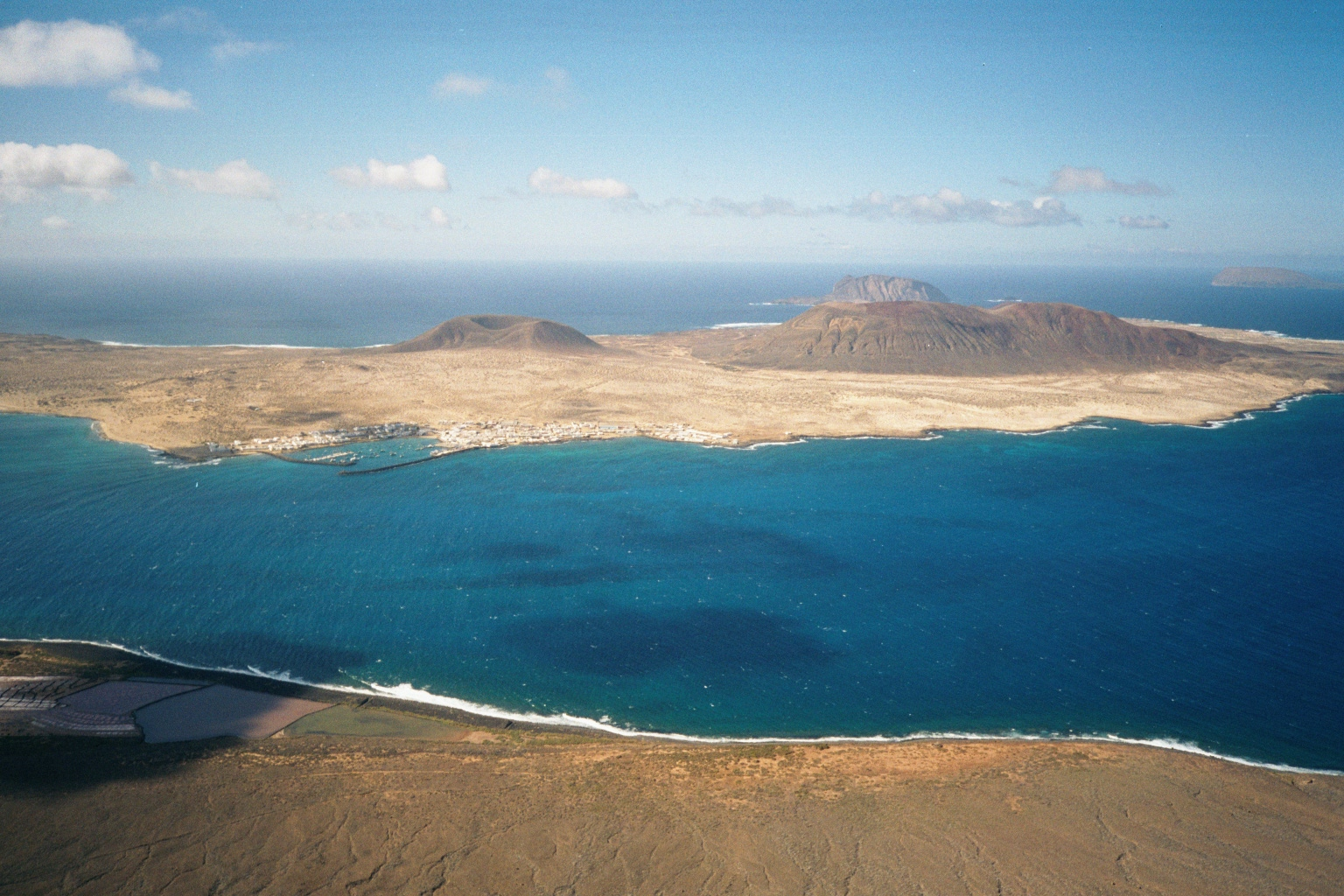 La Isla Graciosa as seen from Mirador del Rio, Lanzarote, Canary Islands.